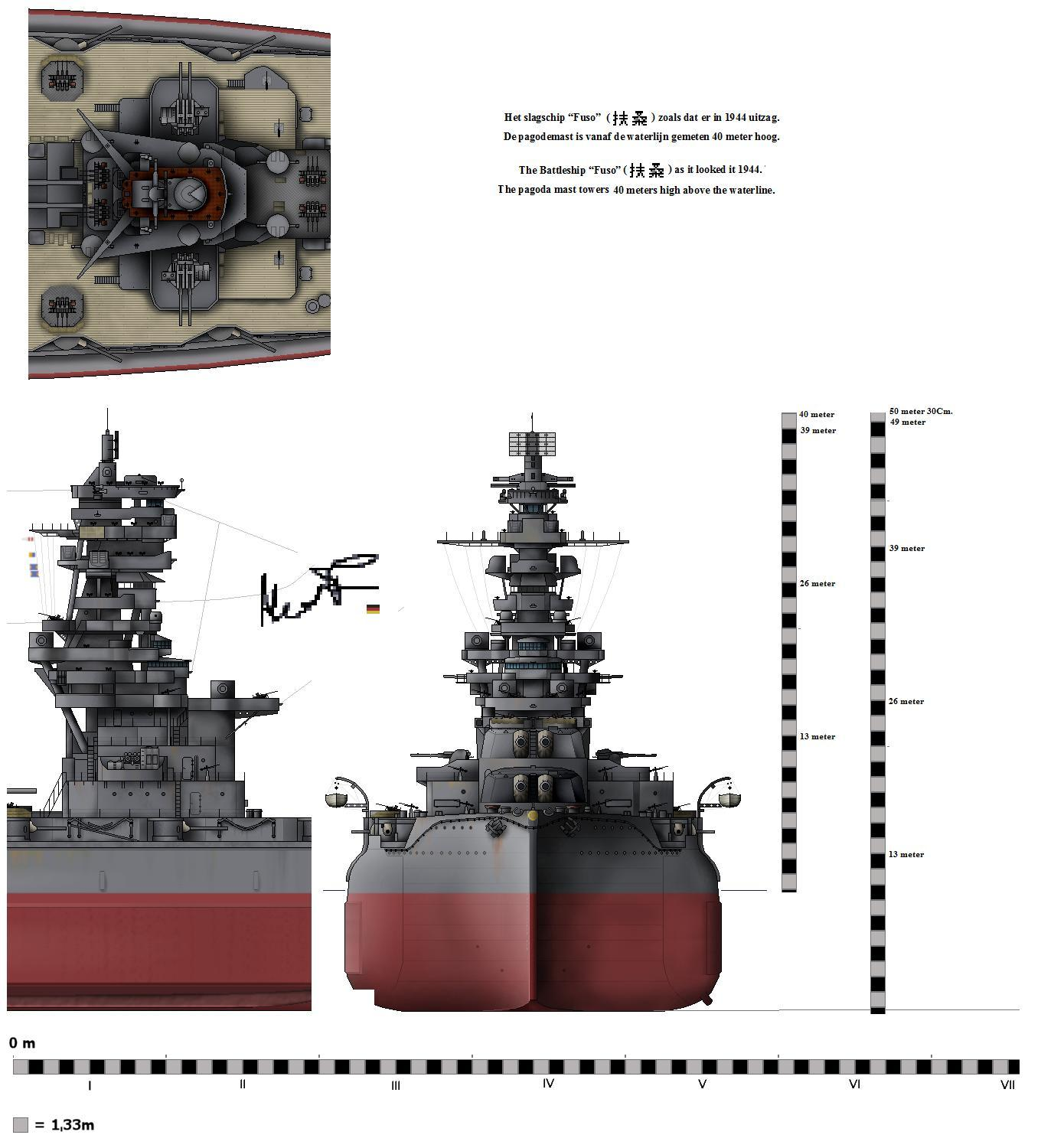 Pagodemast van de Fuso in 1944 met maatstok